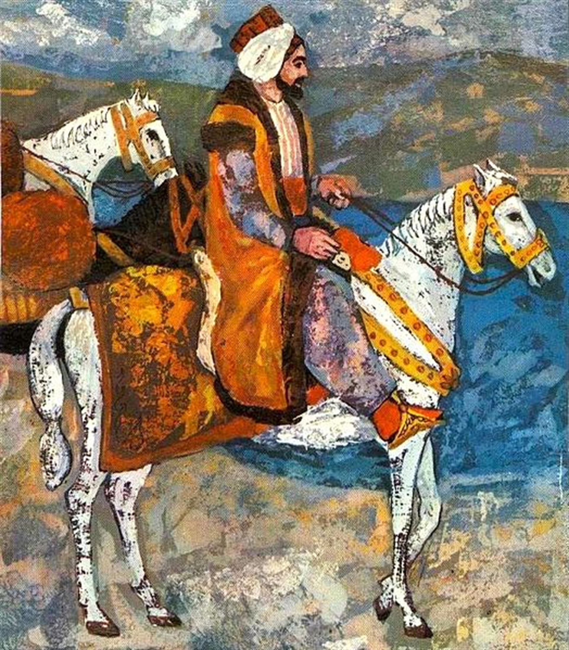 Evlija Cselebi (oszmán-törökül: اوليا چلبي; török: Evliya Çelebi; Isztambul, 1611. február 25. – Kairó, 1684 vagy Isztambul, 1687) török világutazó, történetíró.